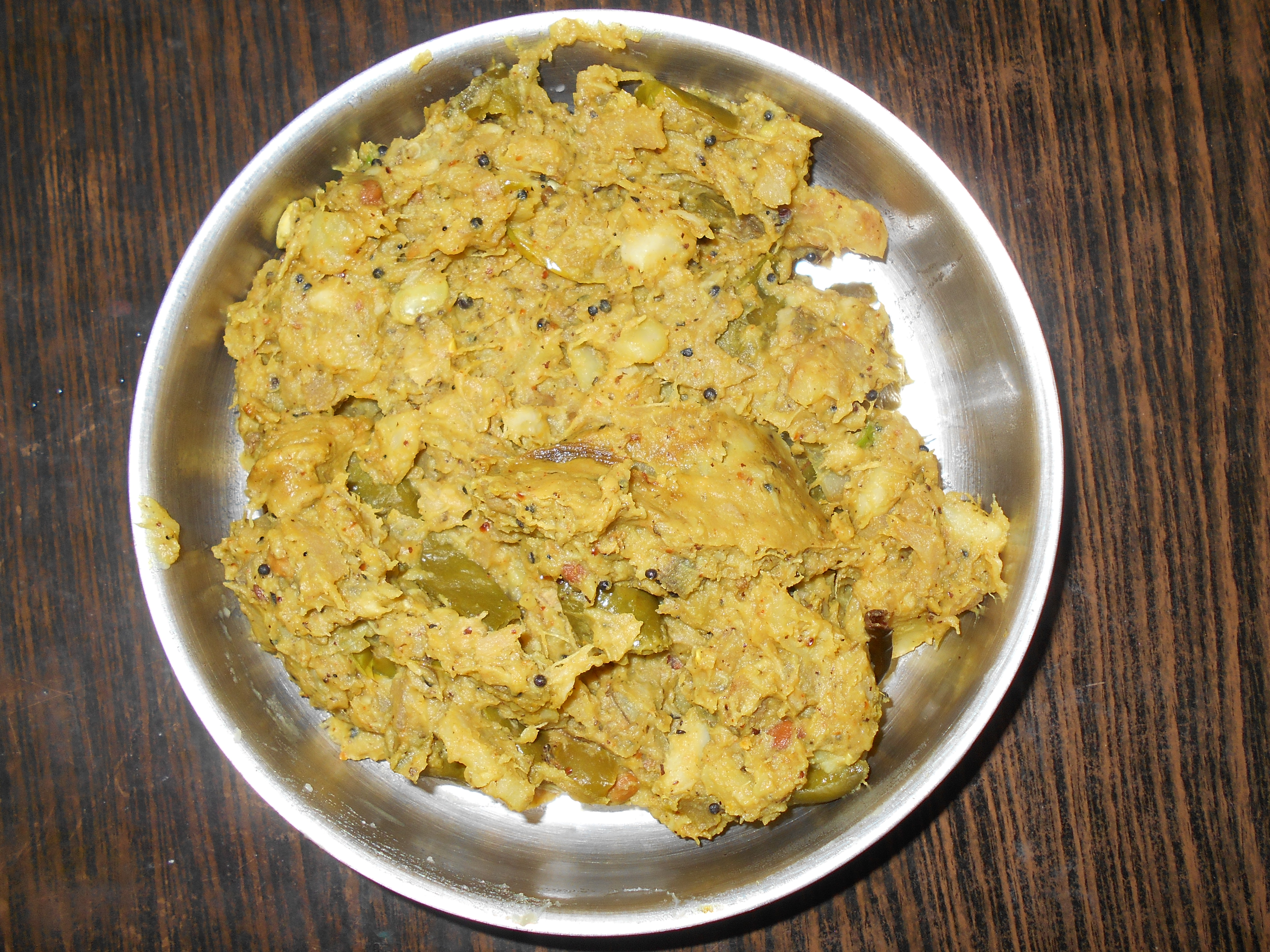 লাবড়া